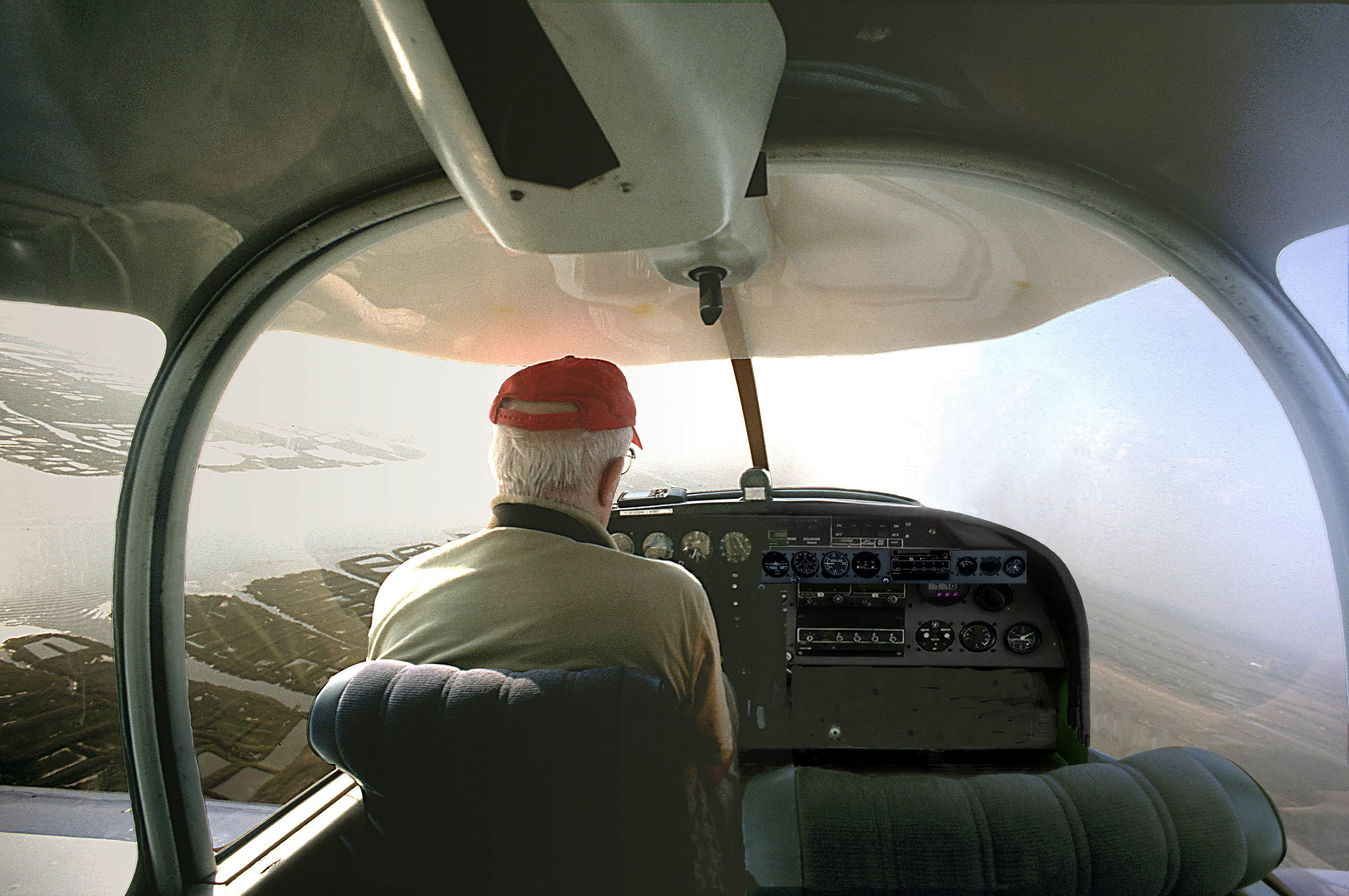 le prospecteur archéologique aérien Jacques Dassié en vol